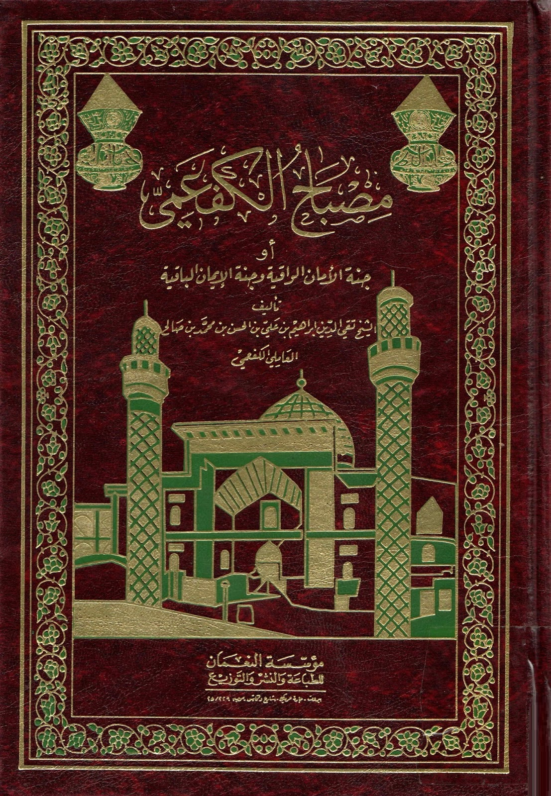 مصباح الكفعمي كتاب: مصباح الكفعمي او جنة الامان الواقية وجنة الايمان الباقية تأليف: الشيخ تقي الدين ابراهيم بن علي الحسن بن محمد بن صالح العاملي الكفعمي الناشر: دار الكتب العلمية - مؤسسة مطبوعات اسماعيليان الطبعة: الثانية 1349هـ عدد الصفحات: 774